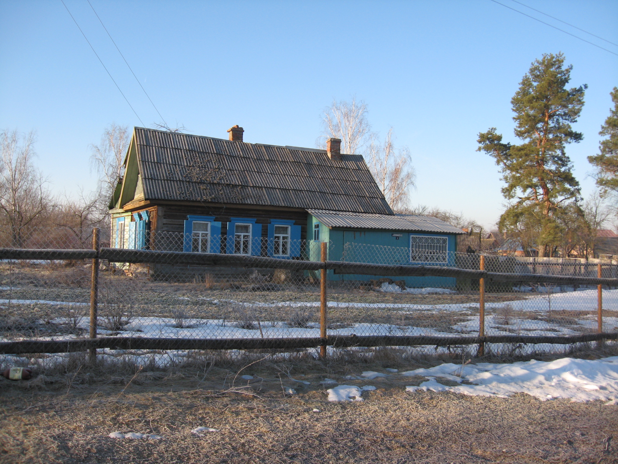 Родны дом Фёдара Піскунова. Вёска Раманавічы